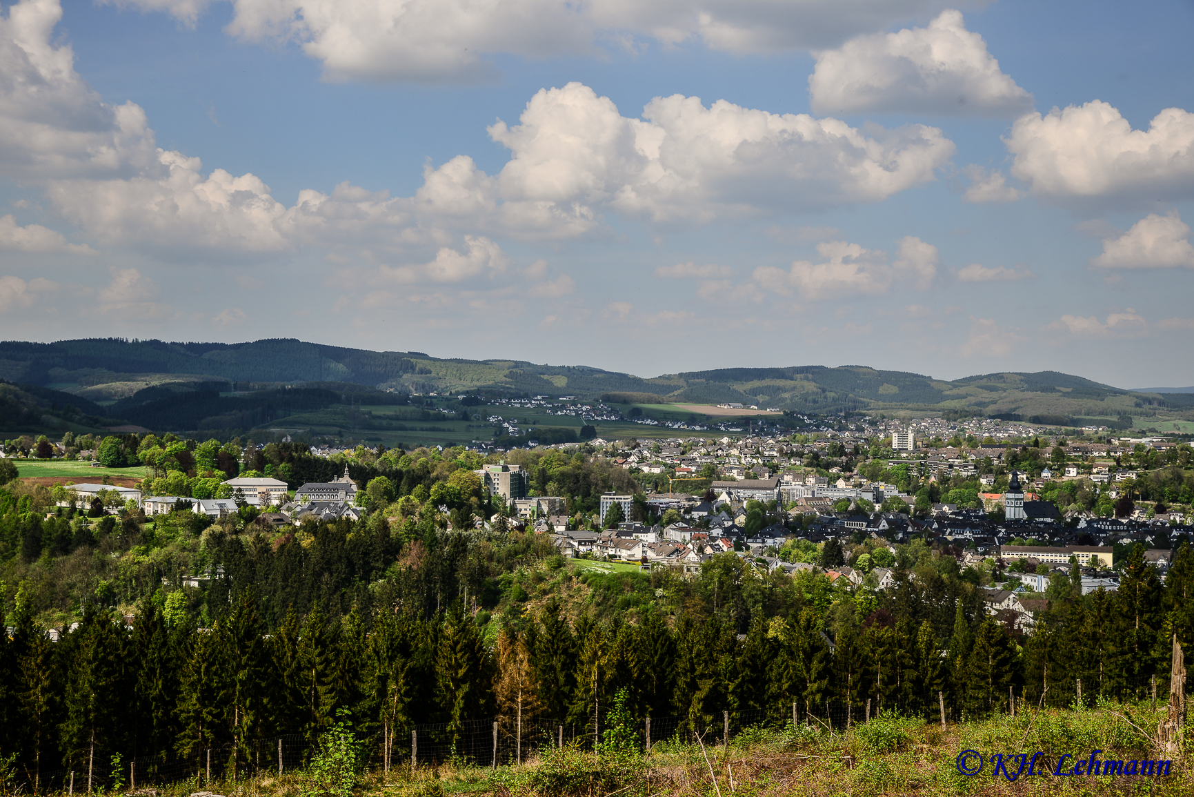 Attendorn